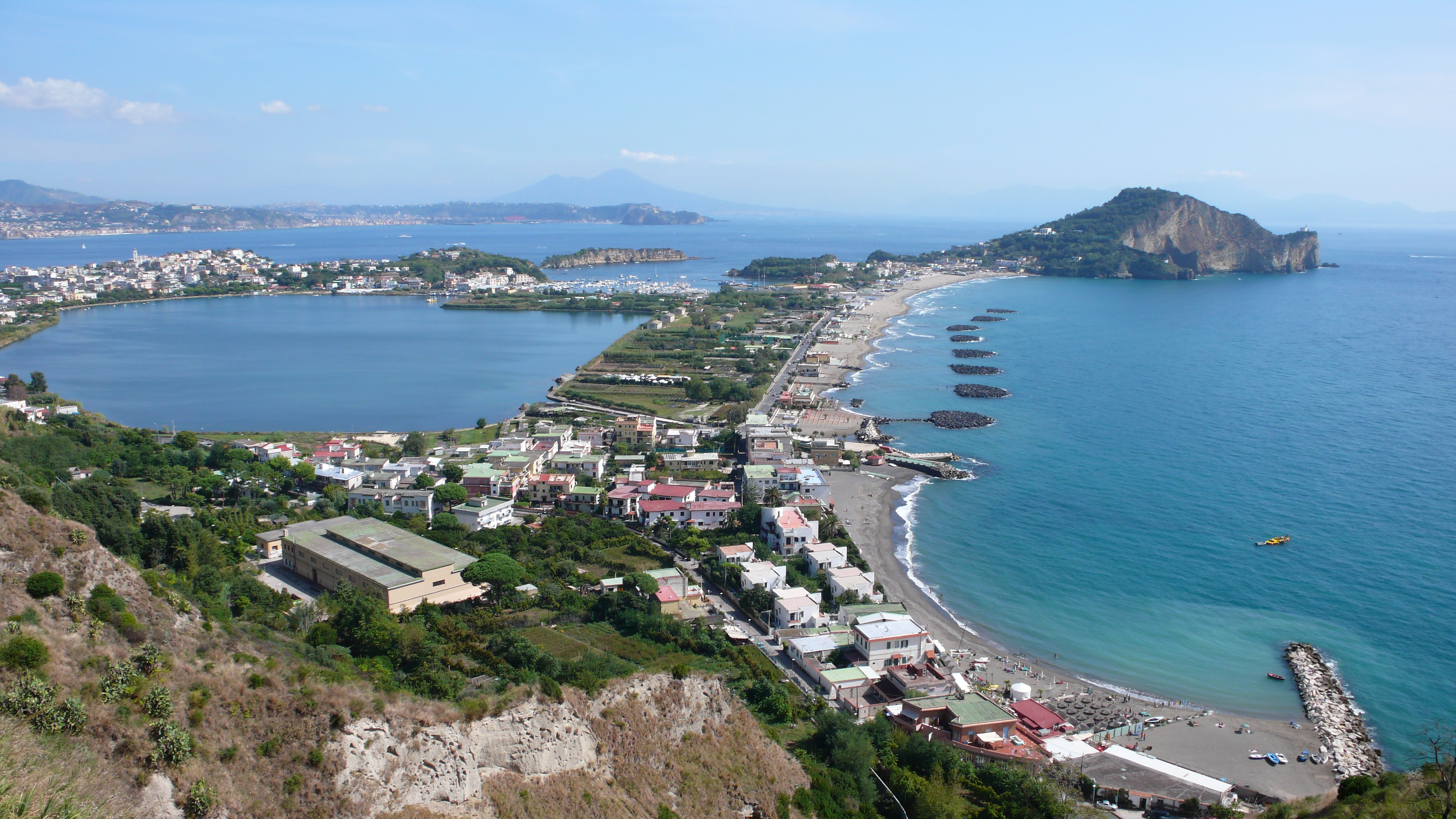 Comune di Bacoli: Lago Miseno, spiaggia di Miliscola, e Capo Miseno.